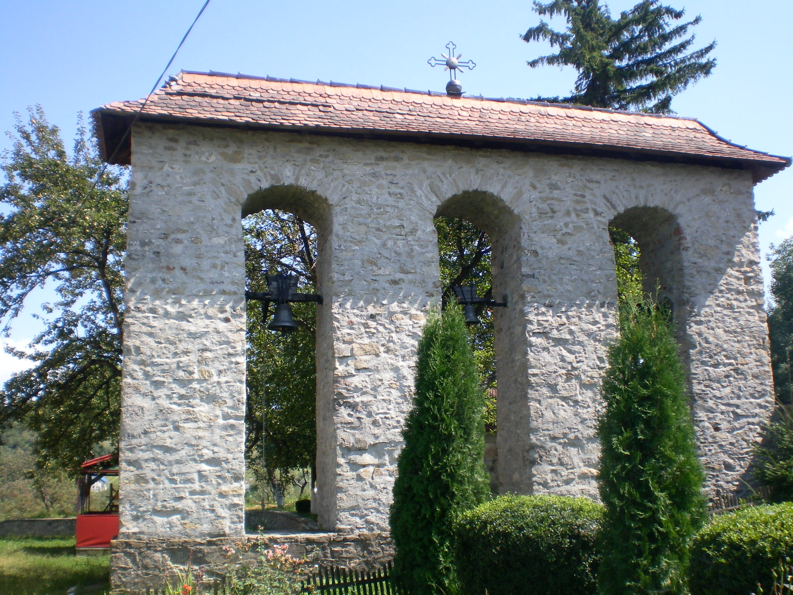 Biserica Sfânta Treime din Siret. 02